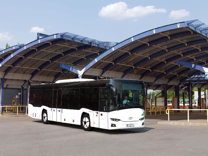 InterUrbino